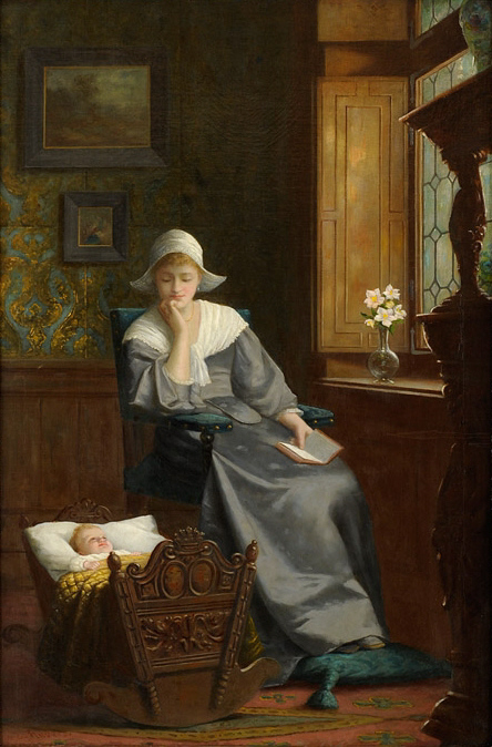 Mutters ganzer Stolz. Signiert. Öl auf Leinwand, 87 x 58 cm